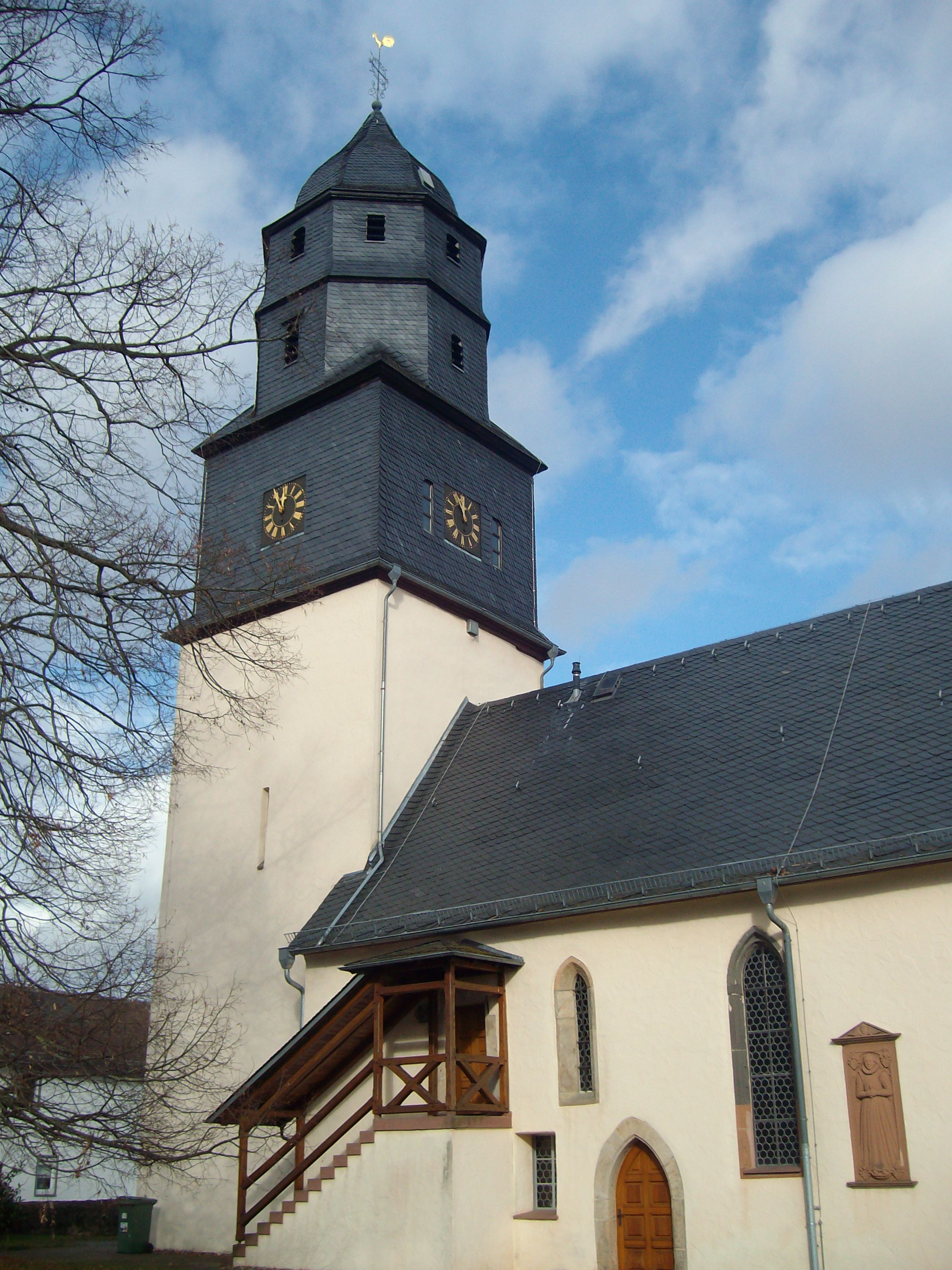 Evangelische Kirche Alten-Buseck, Hessen, Deutschland